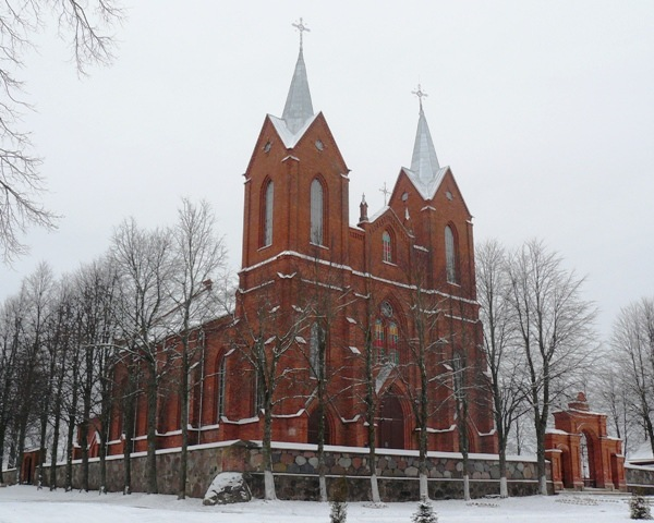 Костел Девы Марии, 1910 г. Дер. Мнюто-2, Глубокский район. Фото путешествия по Беларуси.